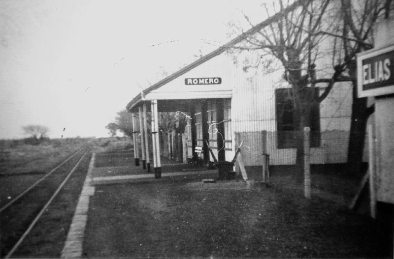 Estación Elias Romero del Ferrocarril Midland en el año 1940